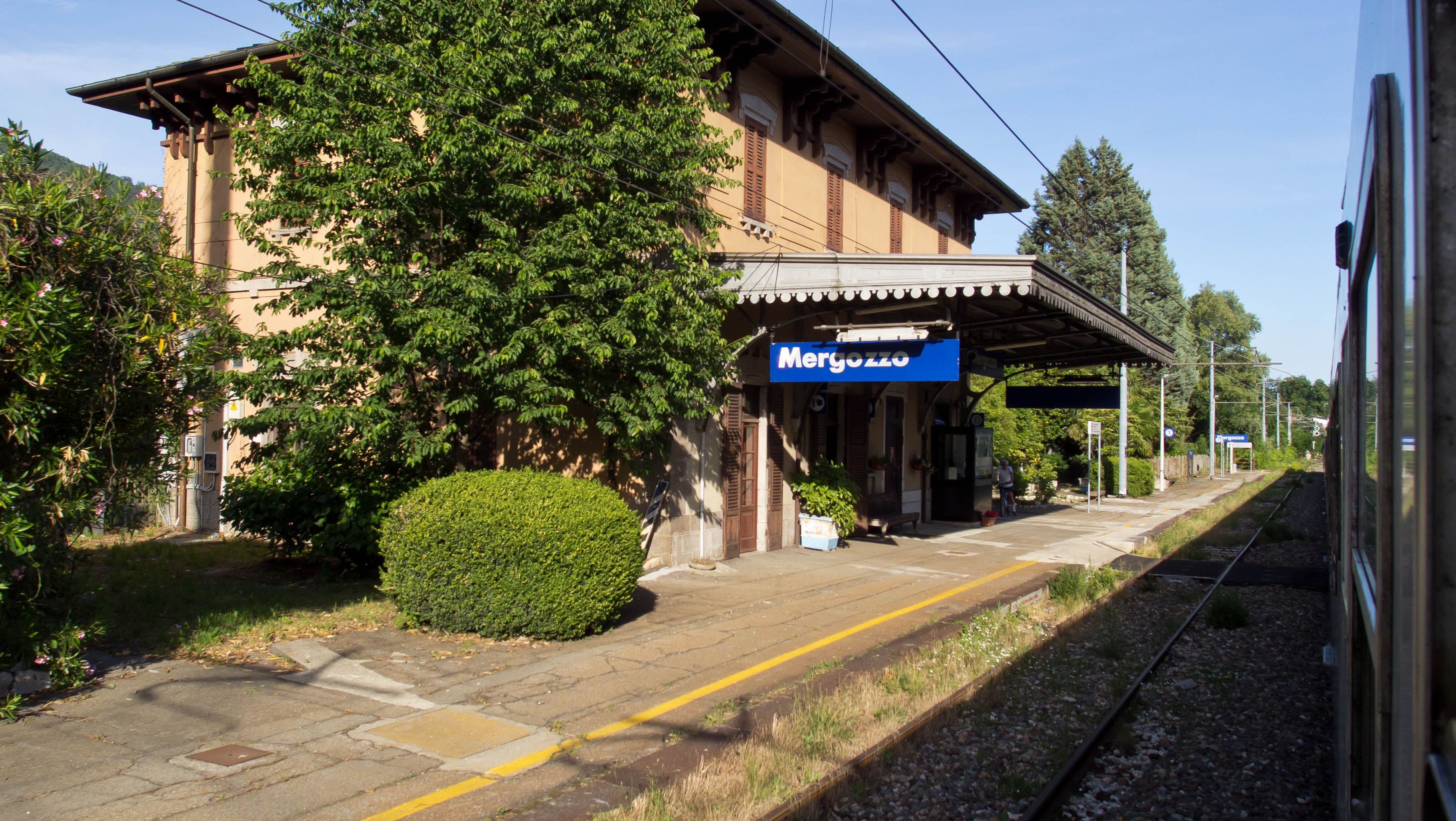 Stazione ferroviaria di Mergozzo